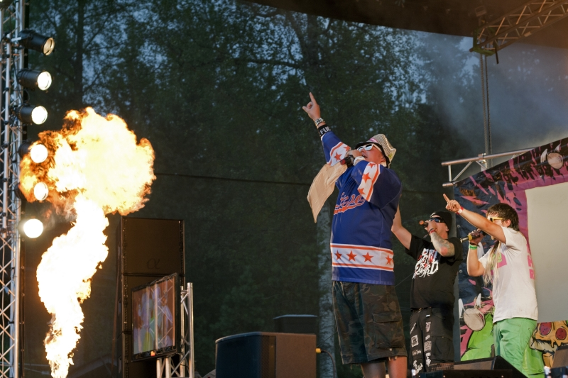 Tiedoston tiedot | Kuvaus = Petri Nygård | Lähde = Oma teos | Päiväys = 31.07.2010 | Tekijä = Janne Iltanen / | Tekijänoikeuksien haltija = Janne Iltanen /